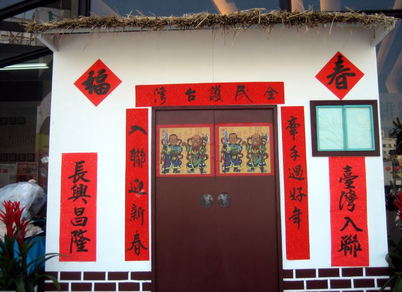 中文（台灣）: 2008中華民國總統選舉，民主進步黨總統候選人謝長廷及副總統候選人蘇貞昌臺中市競選總部（臺中市北屯區文心路四段288號1樓）廣告春聯，宣傳2008年臺灣入聯公民投票。